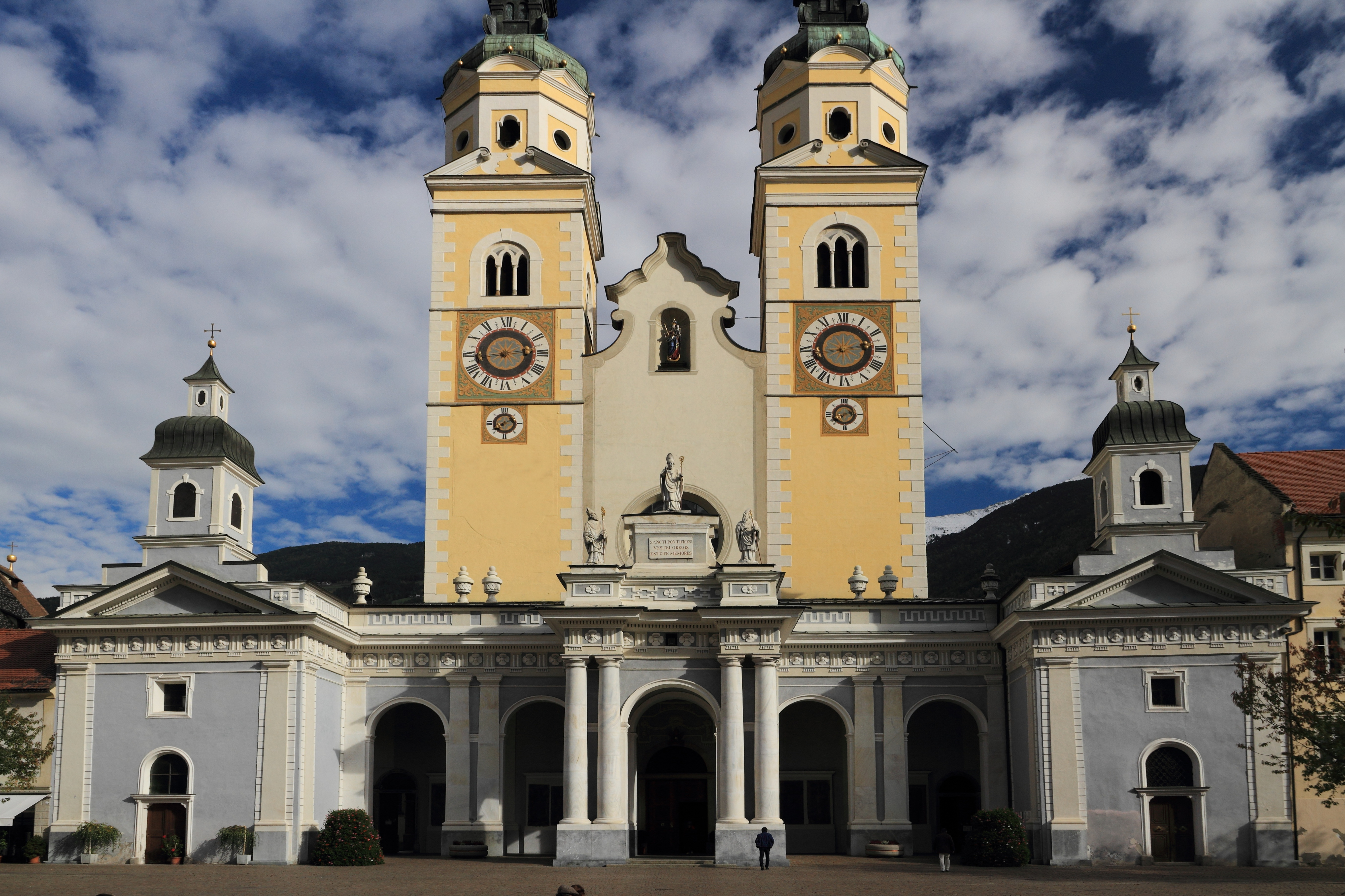 Der Dom in Brixen